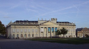 Fridericianum in Kassel, von BinPaul privat fotografiert; PD 22:54, 12. Okt 2003 BinPaul 292 x 162 (14079 Byte) (Fridericianum in Kassel) 22:54, 12. Okt 2003 BinPaul 292 x 162 (14079 Byte) (Friedericianum in Kassel)